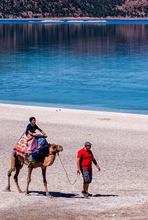 Salda Gölü ve Deve Gezisi - Burdur